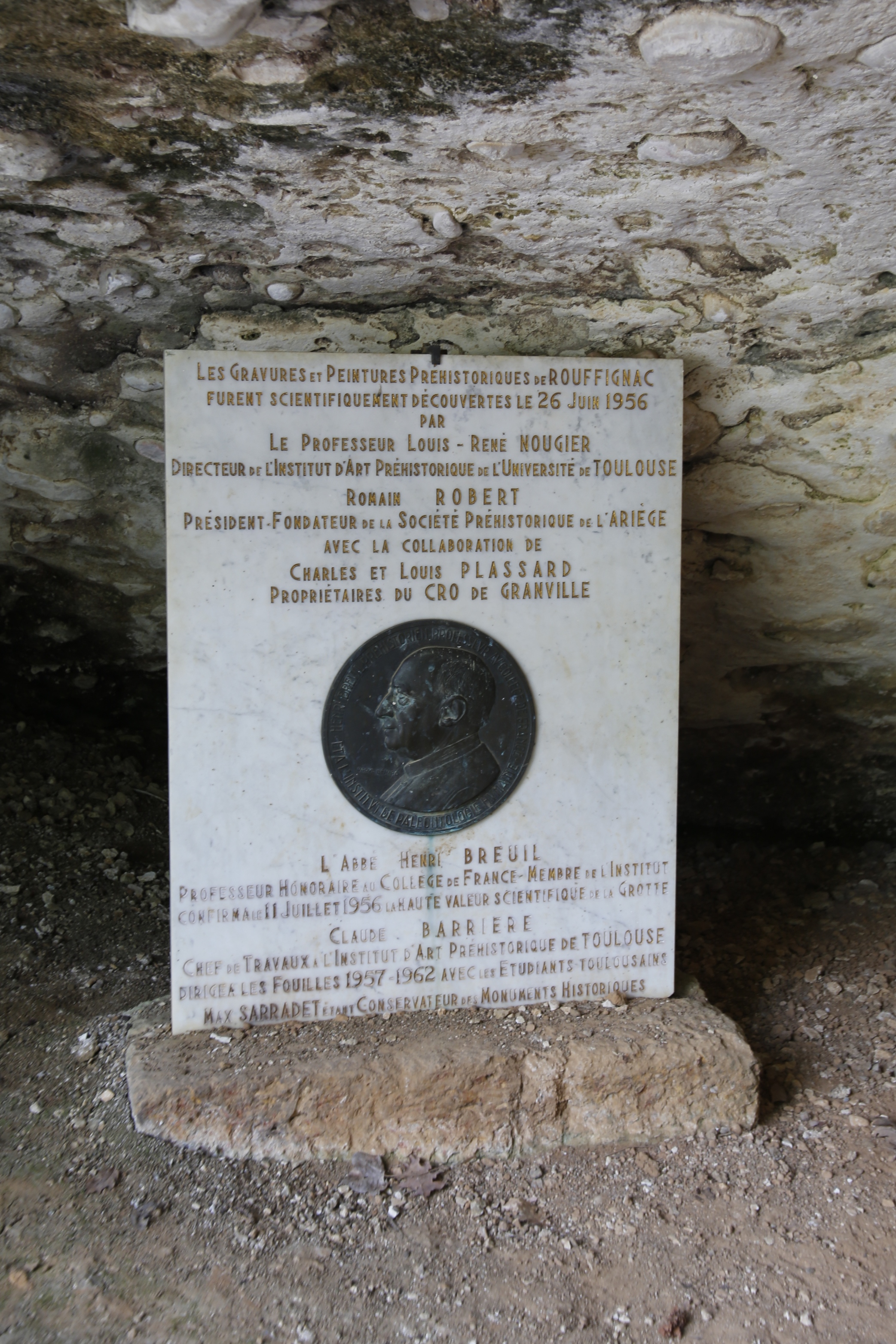 Stèle à l'entrée de la grotte de Rouffignac. .